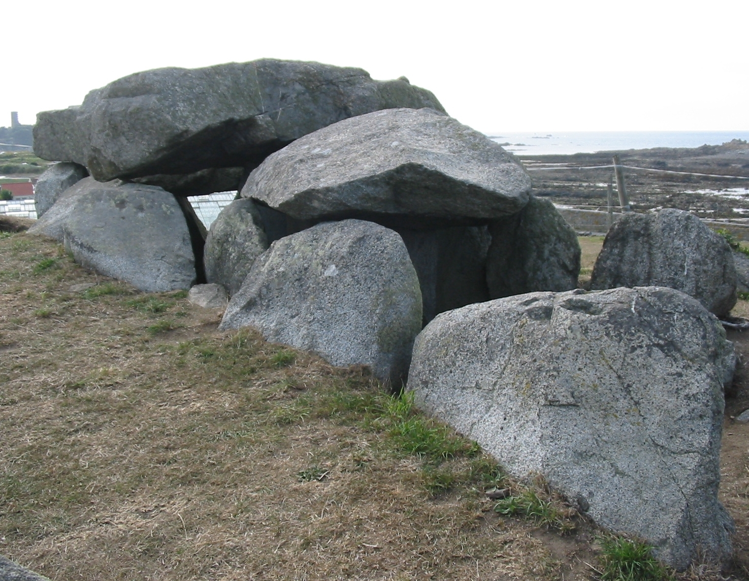 Le Trépied dolmen, Le Catioroc, St Saviour, Guernsey